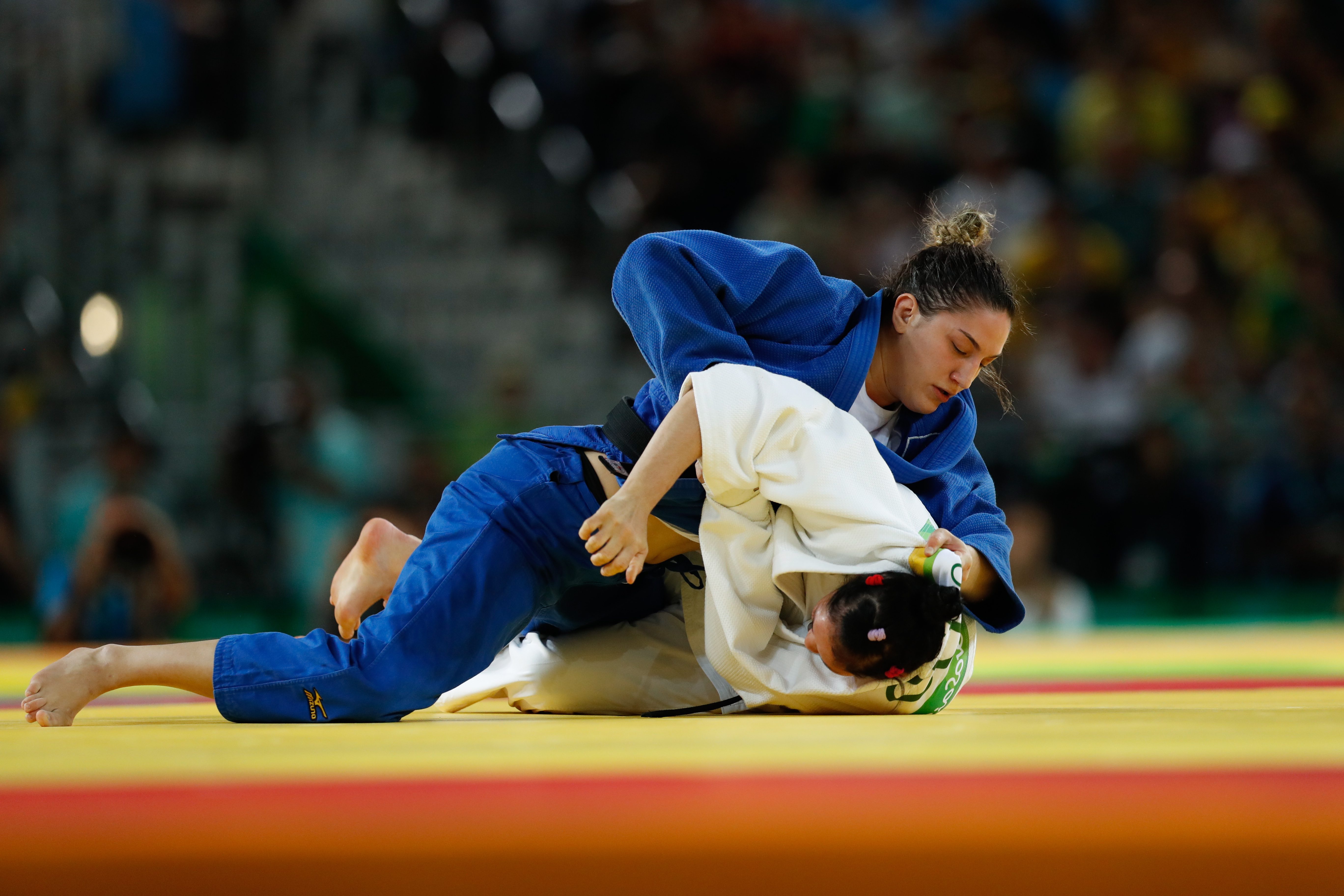 Rio de Janeiro - A judoca brasileira Mayra Aguiar venceu a cubana Yalennis Castillo, na categoria até 78 quilos, e ganhou a medalha de bronze na Rio 2016 (Fernando Frazão/Agência Brasil)